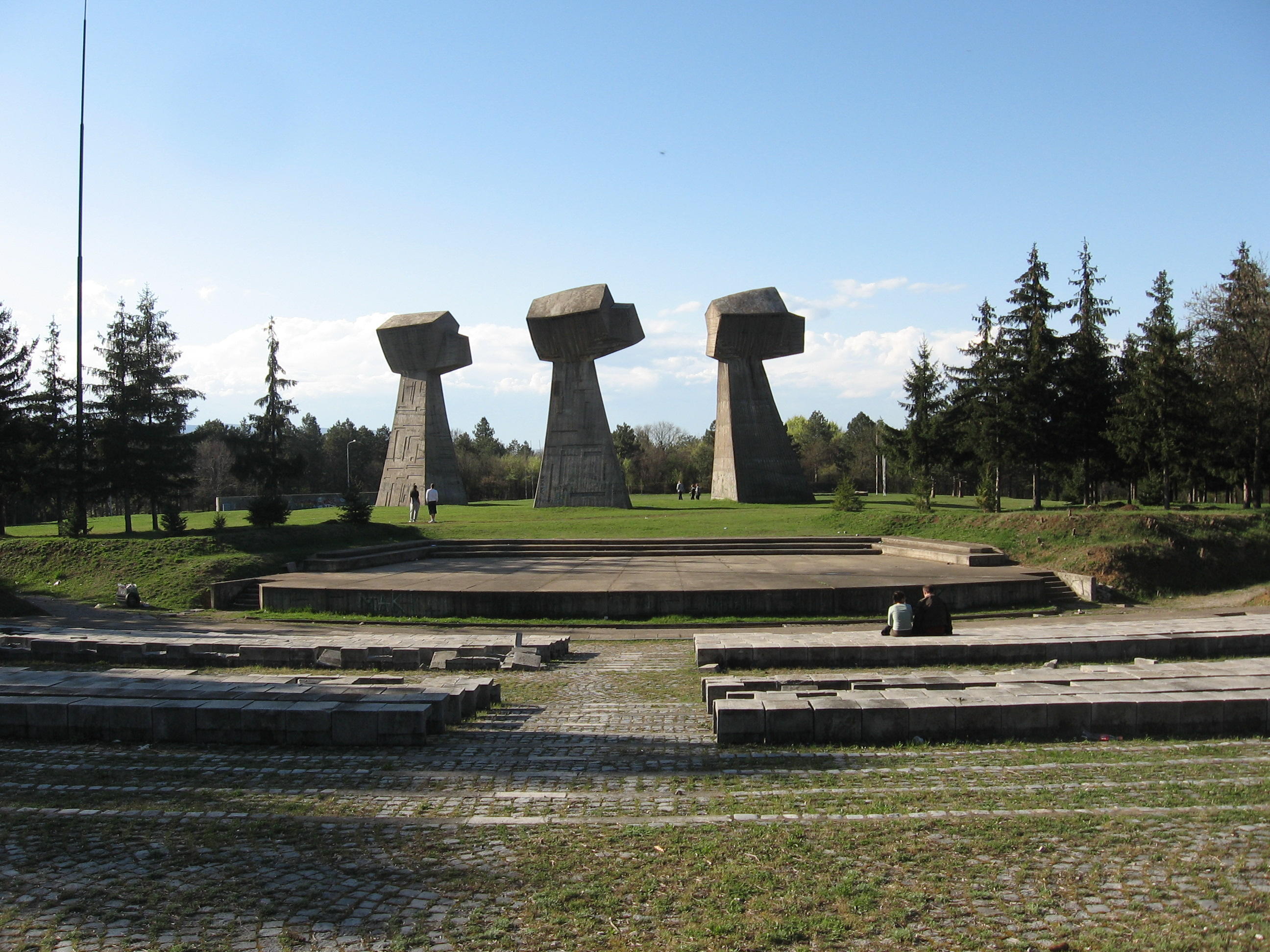 Песнице виђене са отвореног позоришта популарно званог "амфитеатар"